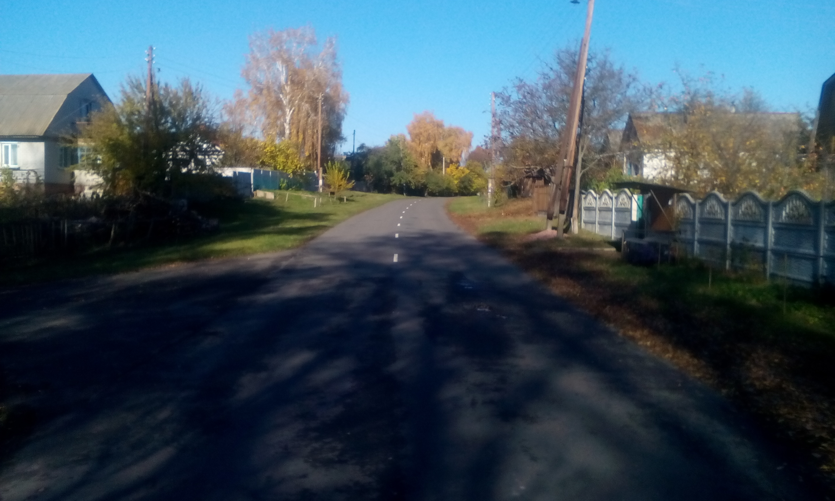 Вид села